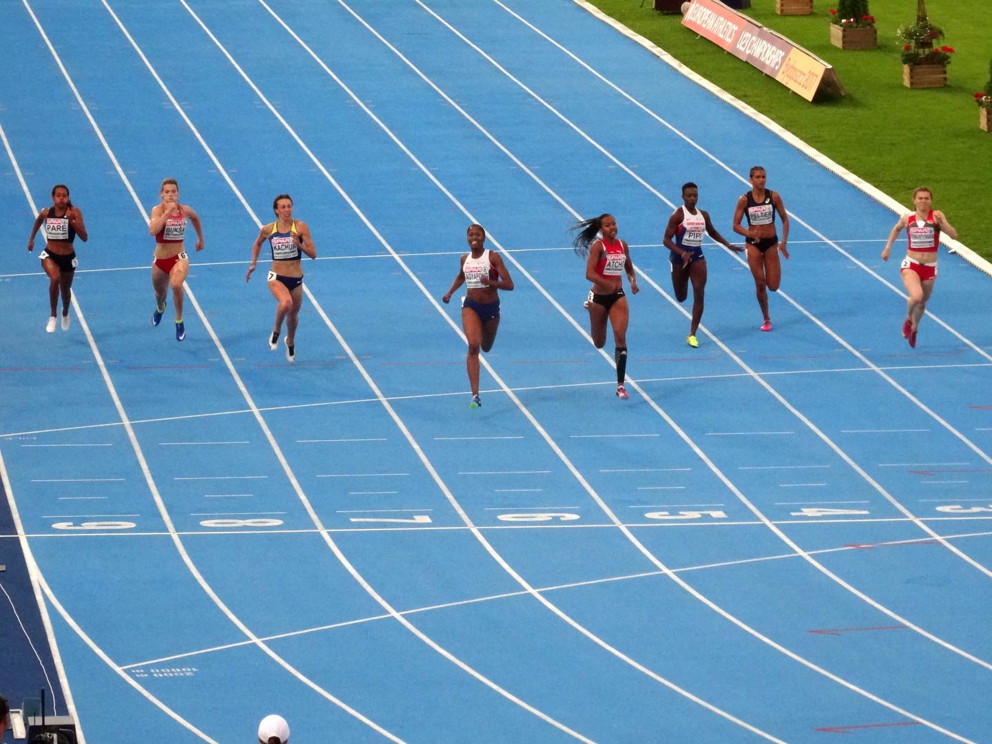 Młodzieżowe Mistrzostwa Europy w Lekkoatletyce U23 w Bydgoszczy 13-16 lipca 2017, finał biegu na 200 m kobiet